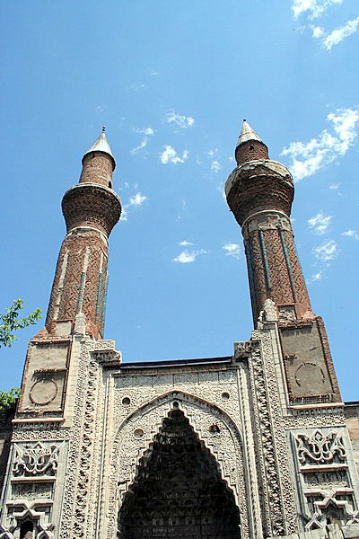 Gök Medrese, Sivas, Turkey